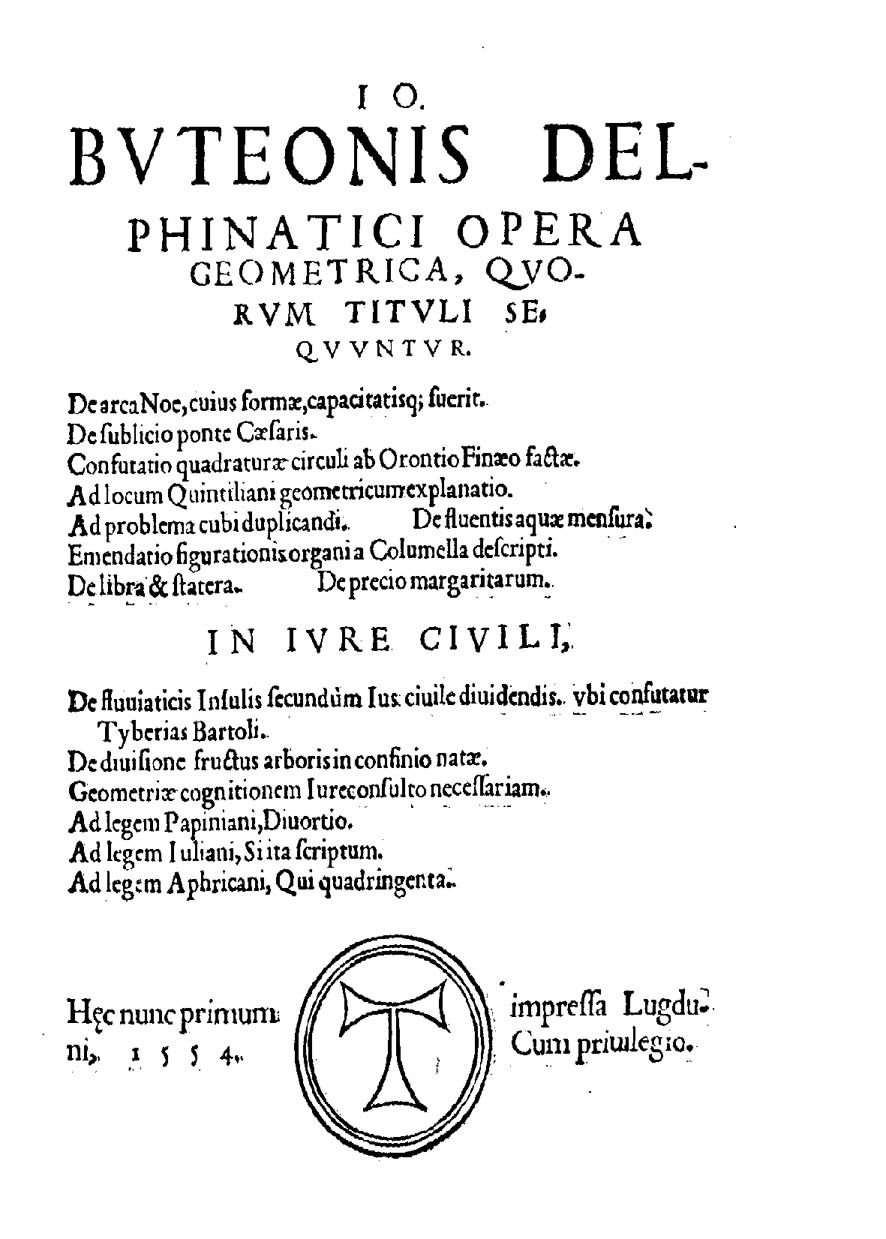 Io. Buteonis Delphinatici opera geometrica, quorum tituli sequuntur. De arca Noe, cuius formae, capacitatisque fuerit. De sublicio ponte Caesaris. Confutatio quadraturae circuli ab Orontio Finaeo factae. .... - Lugduni : [Thomas Bertheau], 1554 (Lugduni : apud Thomam Bertellum, Mense Iunio 1554). - 158, [2] p. : ill. ; 4º. - Contiene, elencate sul front., 15 opere dello stesso A. (le ultime 6 sono introdotte dalla rubrica "In iure civili"; i titoli delle ultime 3 sono: "Ad legem Papiniani, Diuortio", "Ad legem Iuliani, Si ita scriptum", "Ad legem Aphricani, Qui quadringenta") .